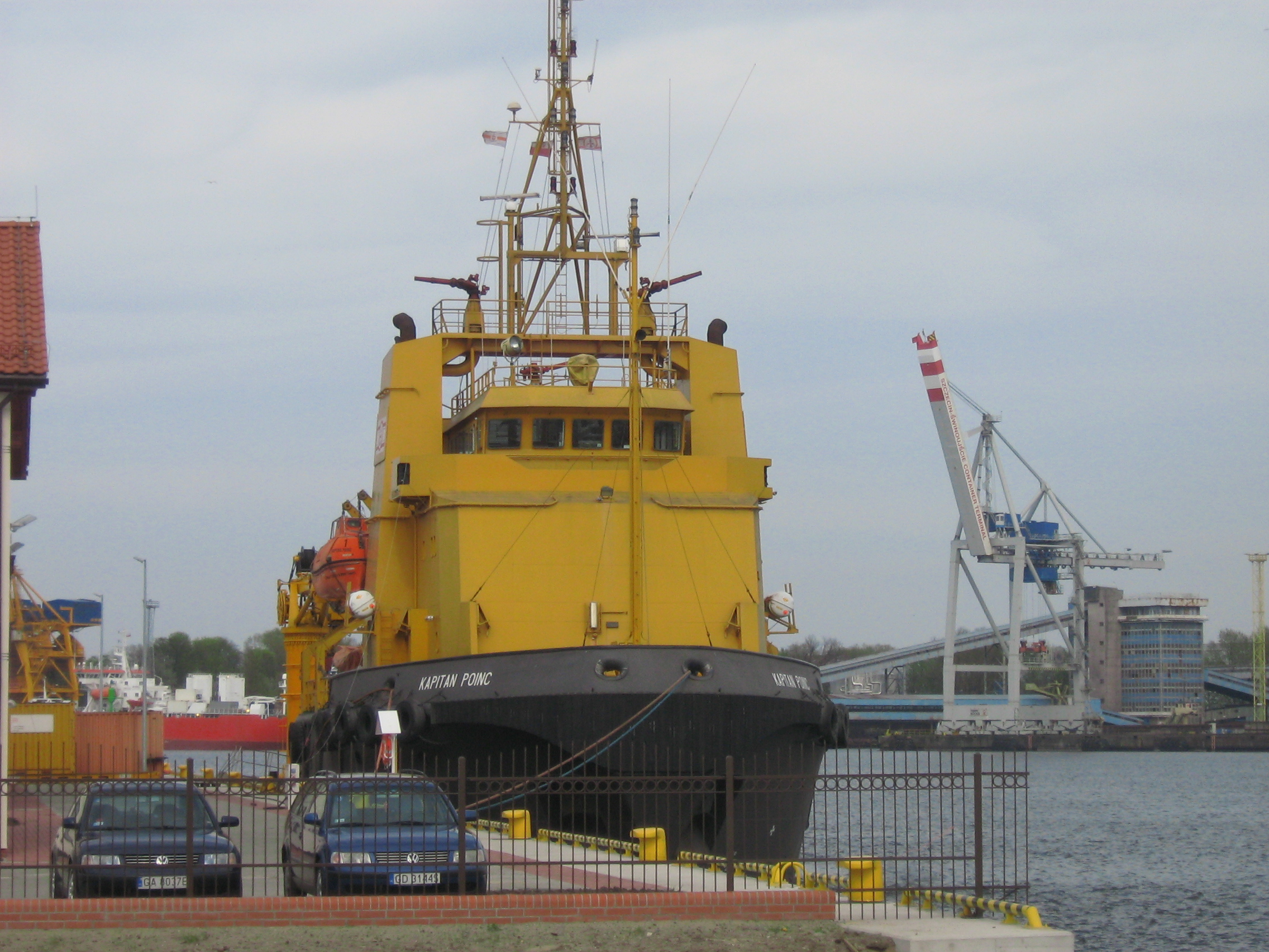 Kapitan Poinc. IMO Number: 9072290 MMSI Number: 261139000 Callsign: SQRU Length: 53 m Beam: 14 m